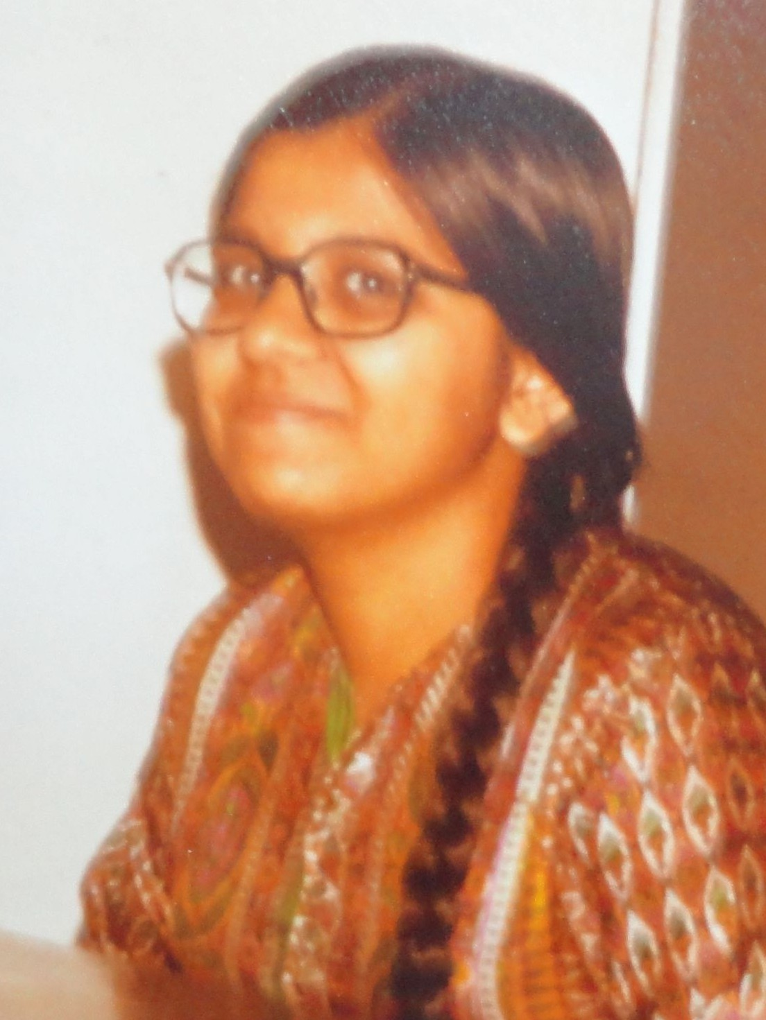 Jayshree Khadilkar, Interzonenturnier 1979 in Rio de Janeiro.